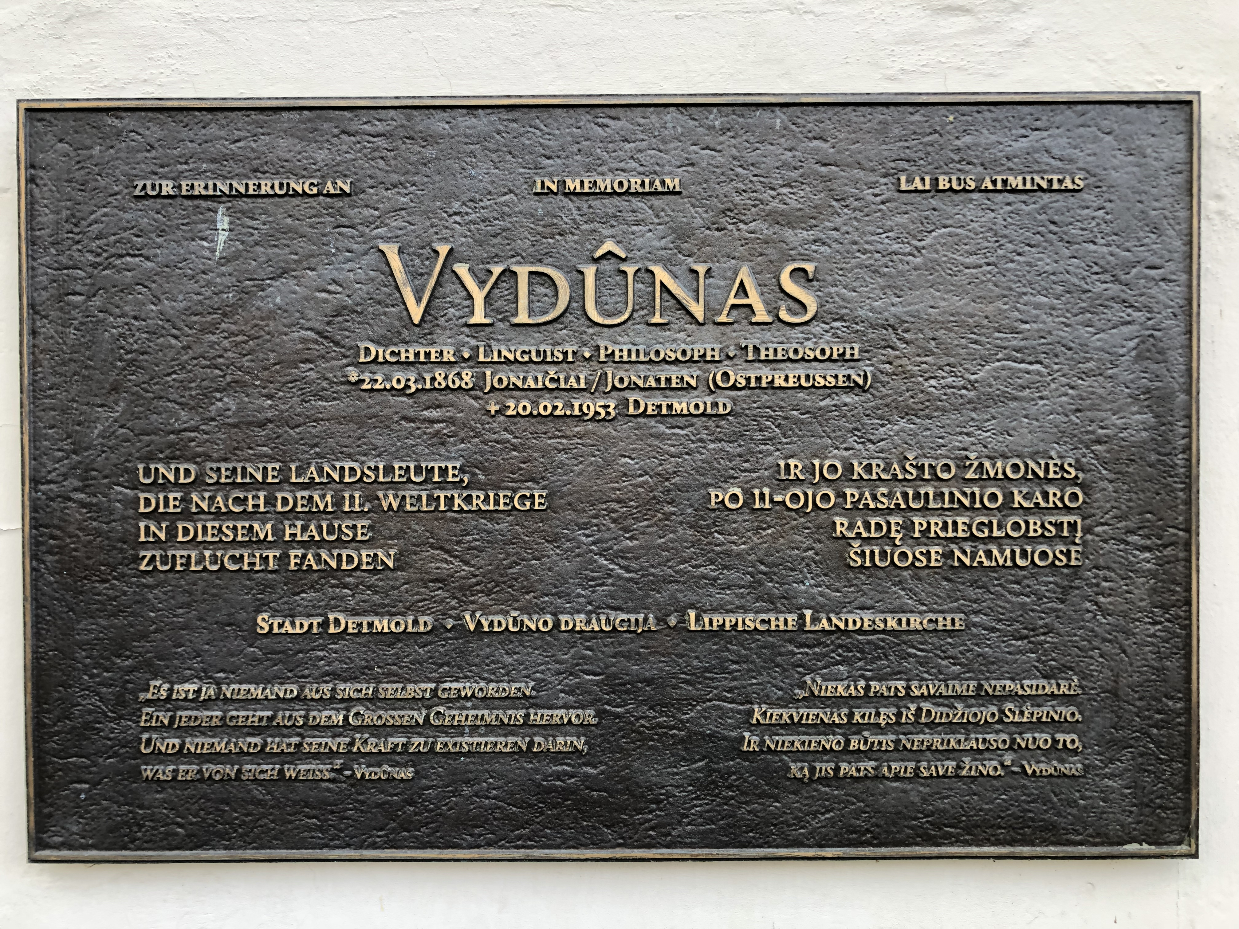 Gedenktafel für Vydūnas an der Fassade der Burse in Detmold. Bürgerlich Wilhelm Storost ist heute in Litauen bekannt für seine Wiederbelebung der litauischen Kultur.